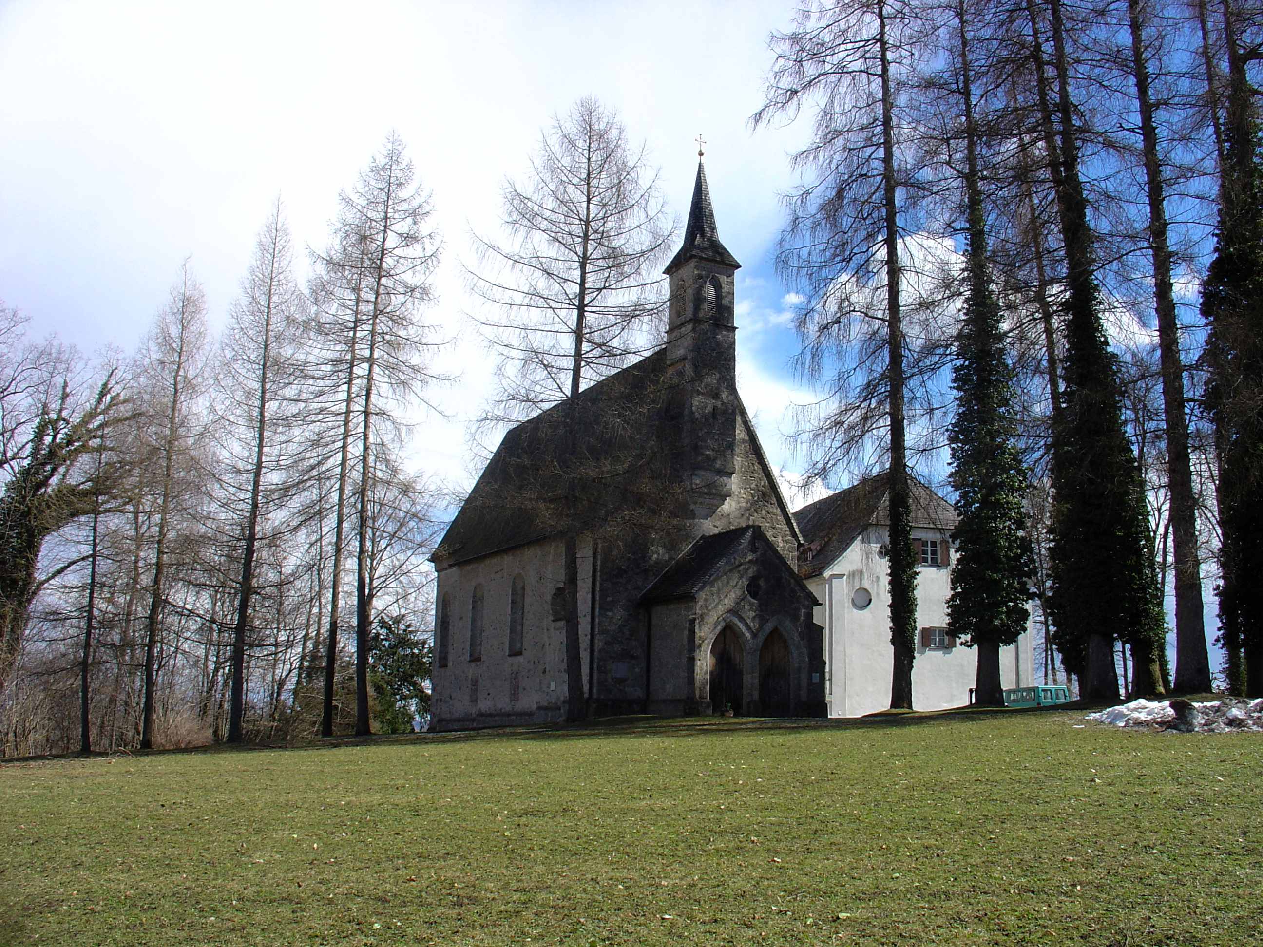 Die ehemalige Pfarrkirche St. Maria von Kloster Herrenchiemsee